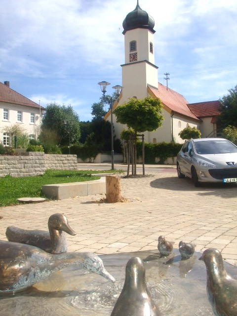 Pfarrkirche St. Johannes Baptist, Harthausen (bei Feldhausen), Stadt Gammertingen, Landkreis Sigmaringen